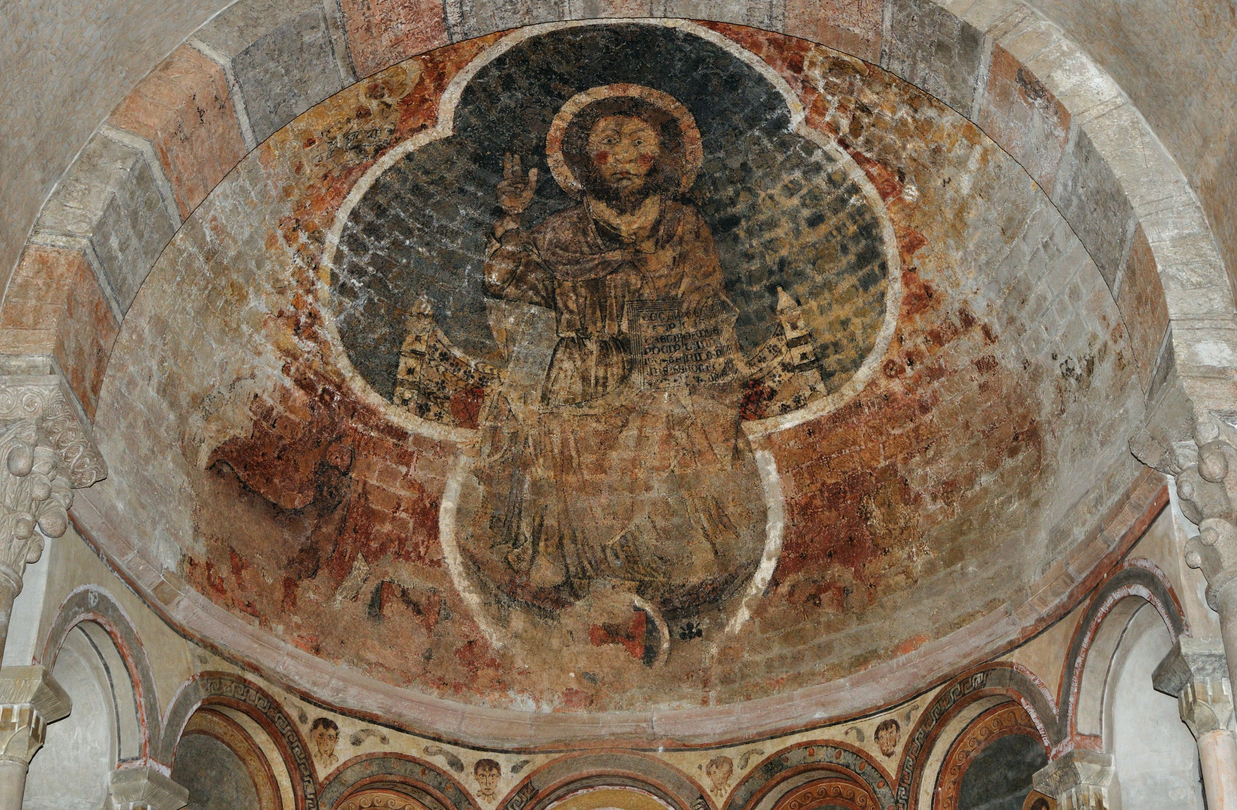 Christ en majesté dans le chœur de la cathédrale Saint-Lizier à Saint-Lizier (Ariège, France)